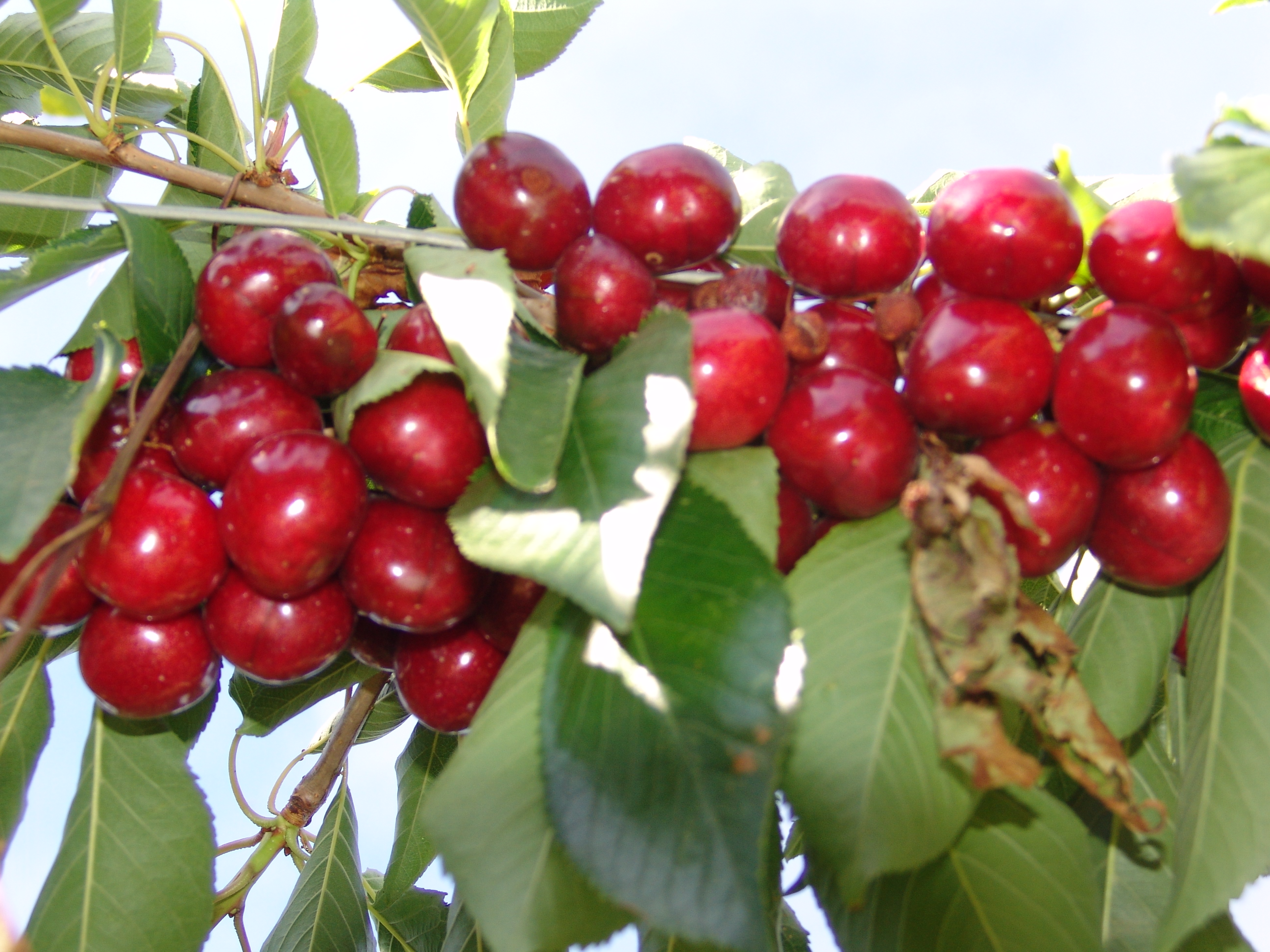 Valle Inferior del Río Chubut